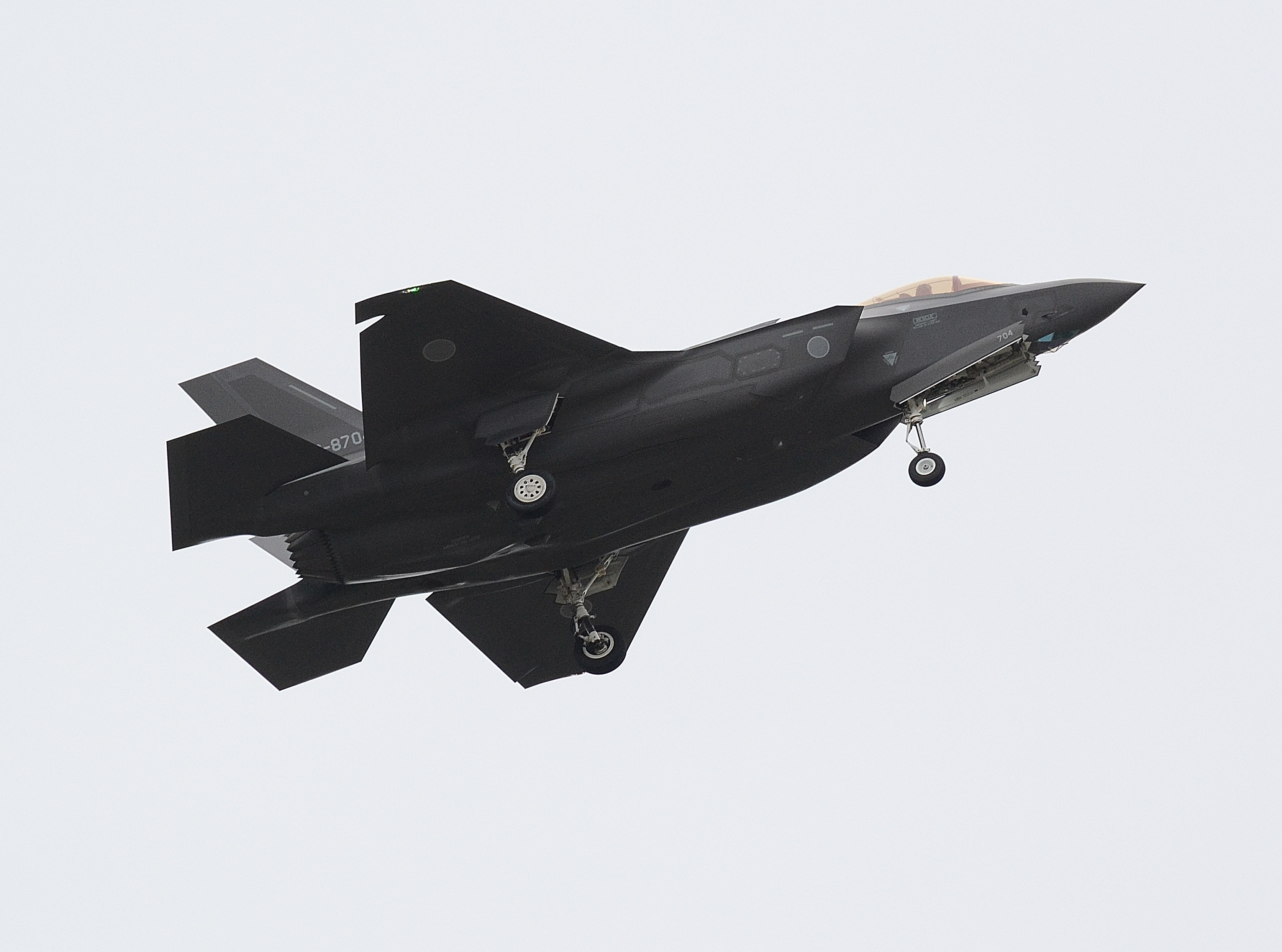 陸上自衛隊朝霞訓練場で行われた平成30年度自衛隊記念日観閲式総合予行で上空を飛行する航空自衛隊のF-35A。